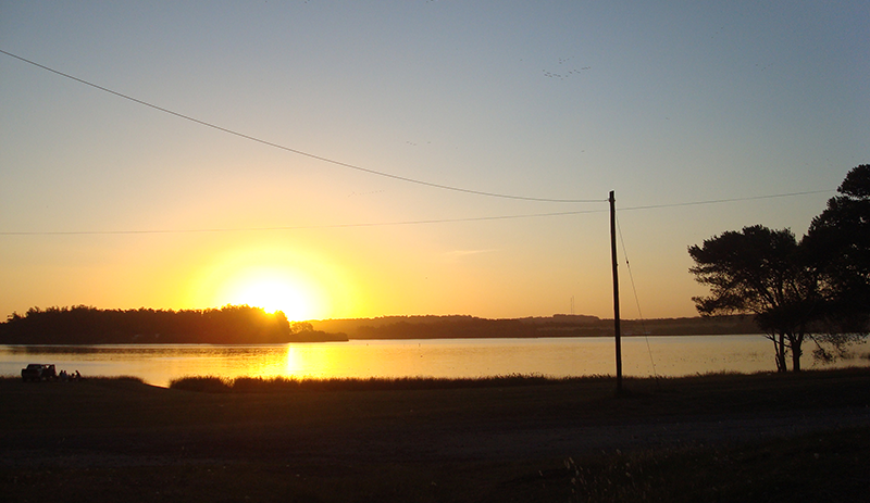 Atardecer en Laguna de los Padres, Mar del Plata, Pcia. de Buenos Aires, Argentina.